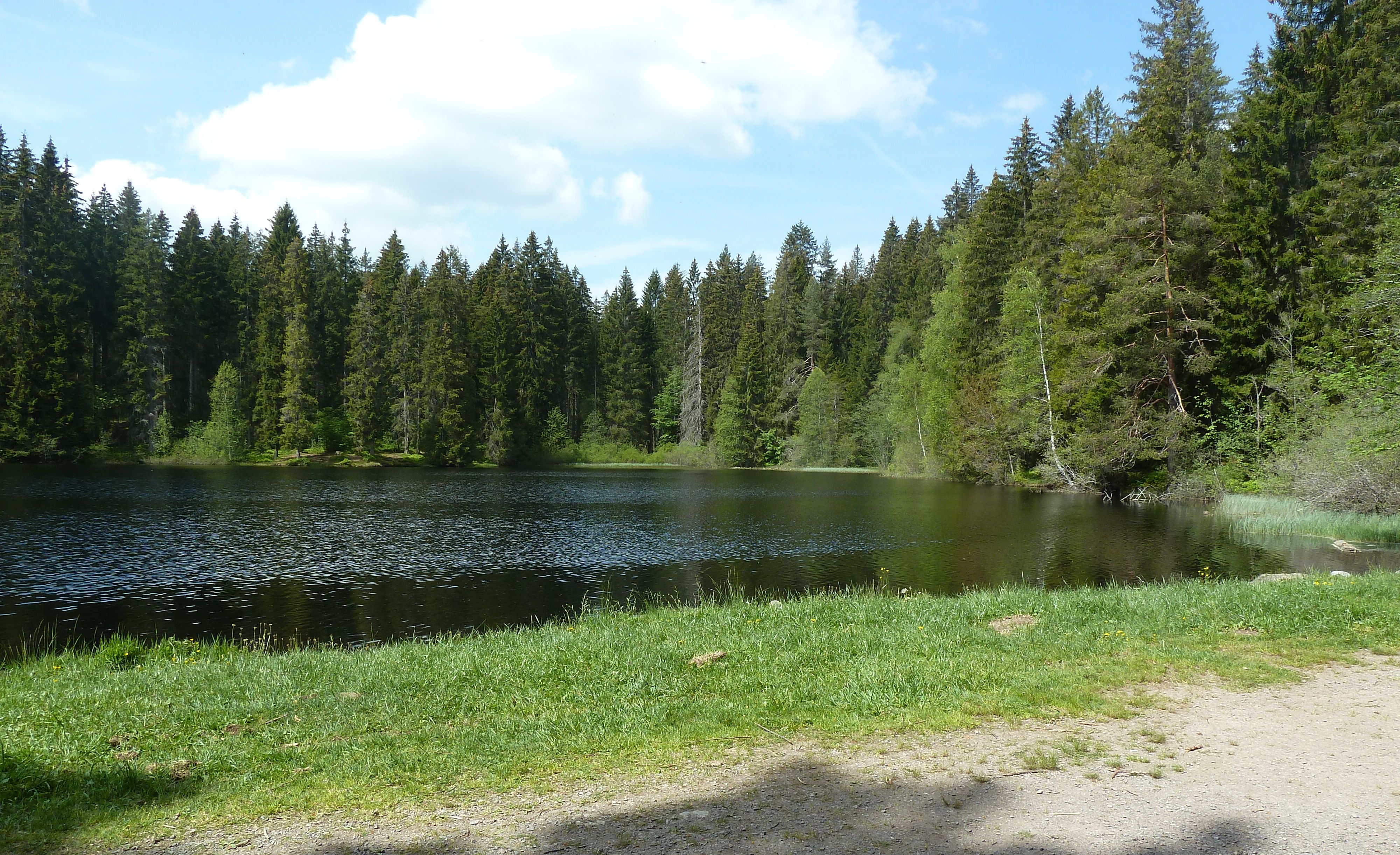 Mathisleweiher im Naturschutzgebiet Eschengrundmoos südlich von Hinterzarten